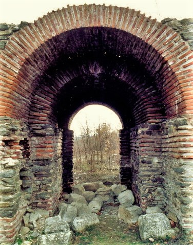 kapija grada,autor Gasha